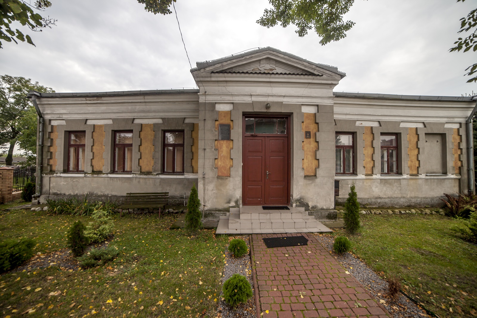 Puchaczów - plebania, 1802